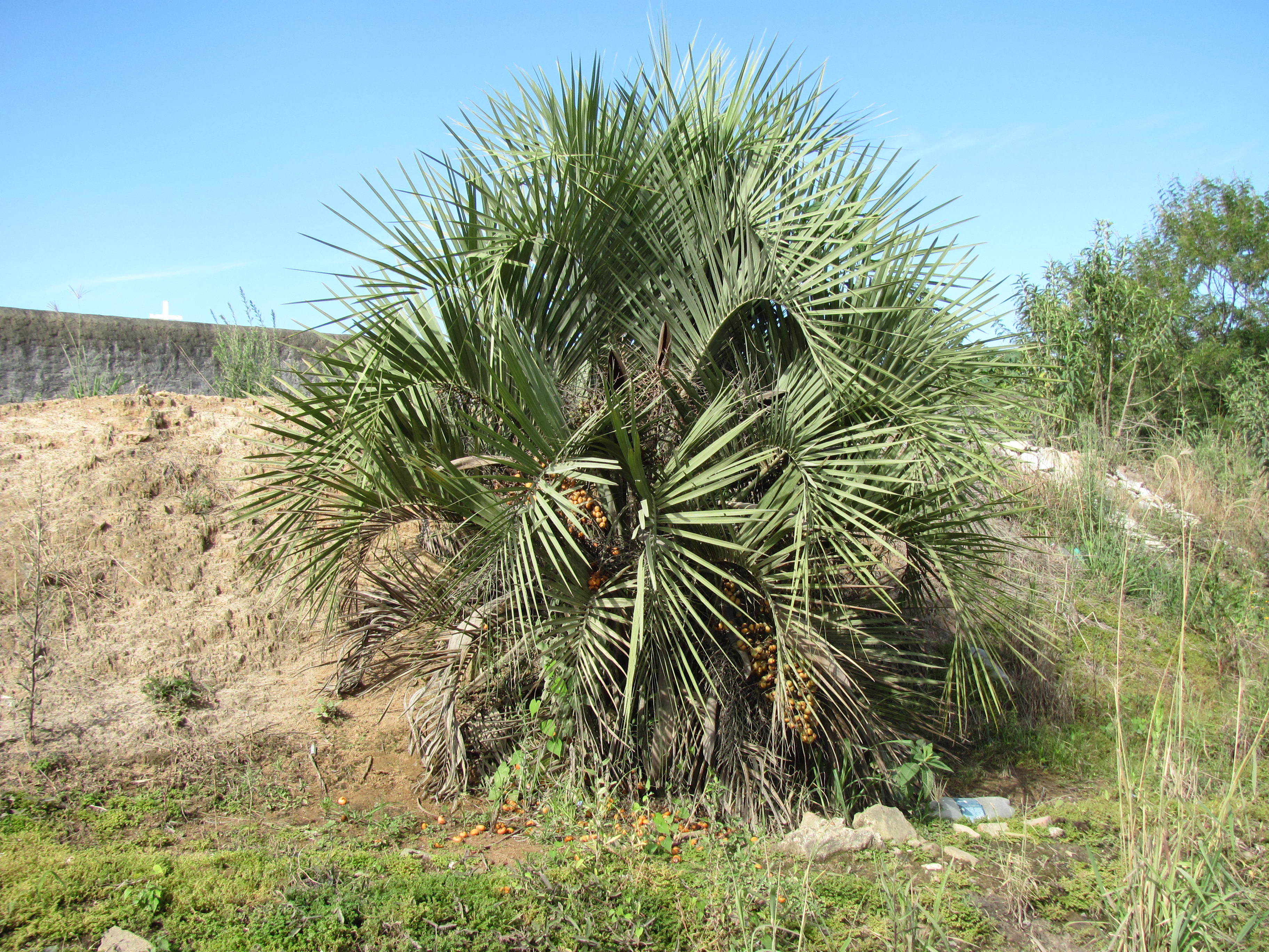 Pé de Butiá em Sertão Santana